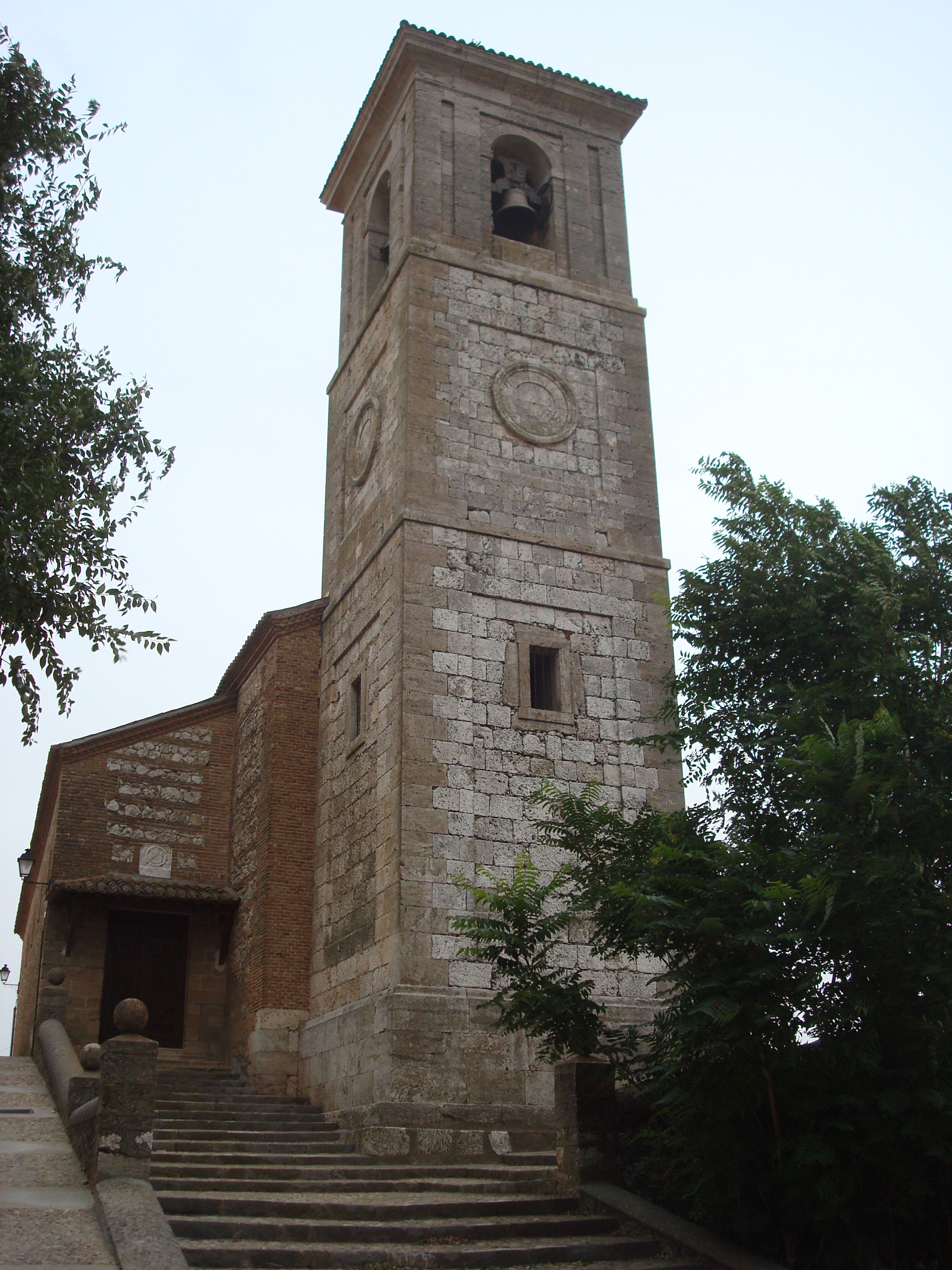 Hita - 006